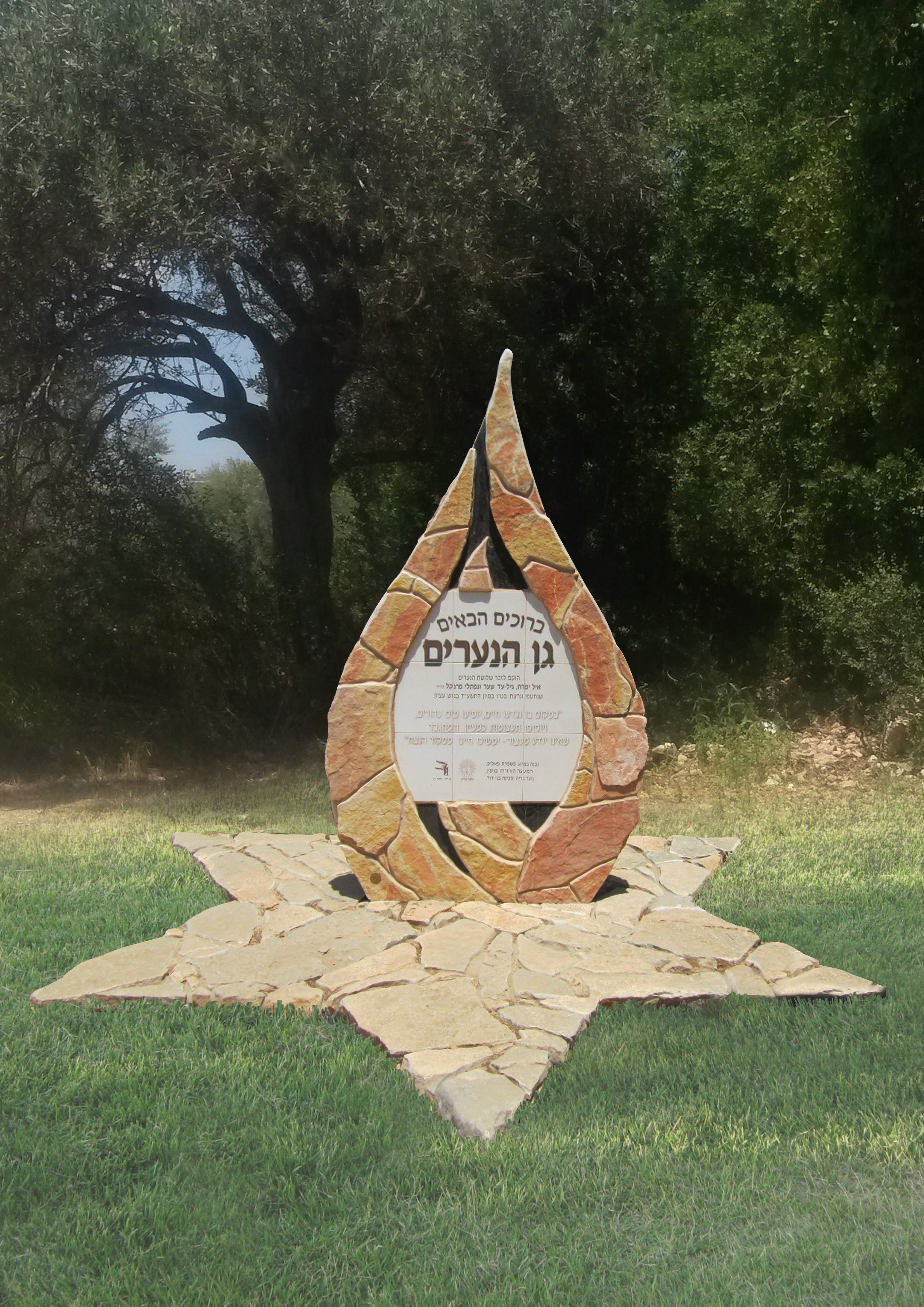 אנדרטה לזכרם בעיינות ענר, האמן אסף קדרון